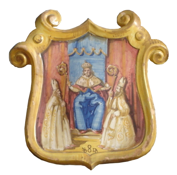 Escudo de Sevilla. Sacado de uno de los muchos existentes en la Plaza de España de Sevilla